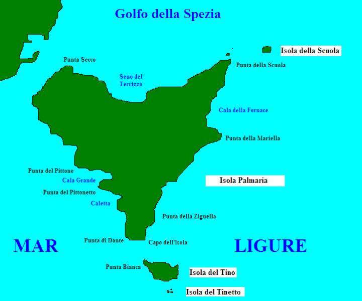 L'Arcipelago Spezzino in Liguria formato dall'Isola Palmaria, Tino, Tinetto e della Scuola.